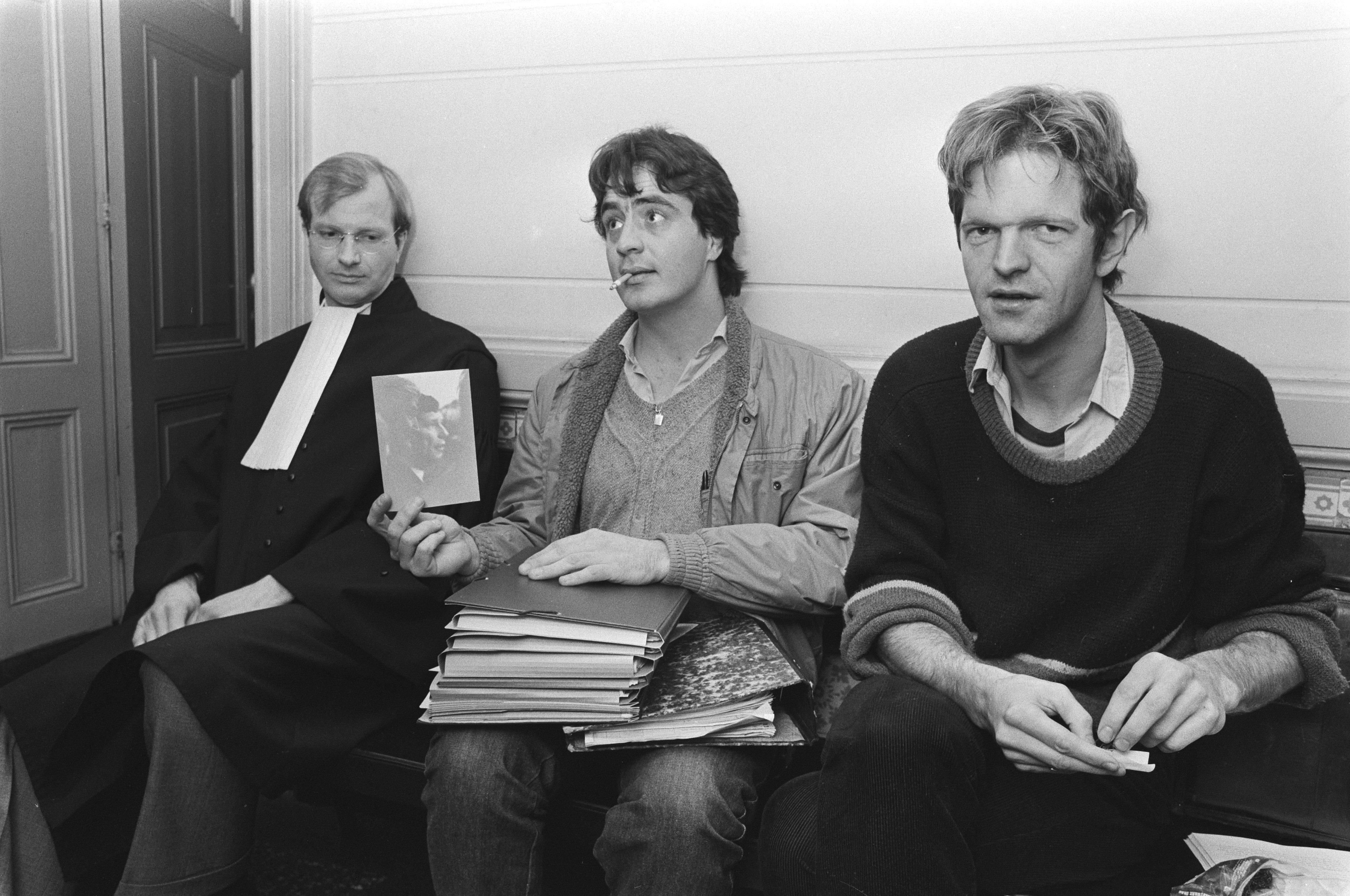 Collectie / Archief : Fotocollectie Anefo Reportage / Serie : [ onbekend ] Beschrijving : Kort geding Geillustreerde Pers tegen onroerend goed handelaar Ronald van der Putte (Haarlem). Boukema, Storms en Fons Burger Datum : 22 januari 1982 Locatie : Haarlem Trefwoorden : GEDING Persoonsnaam : Geillustreerde Pers Fotograaf : Bogaerts, Rob / Anefo Auteursrechthebbende : Nationaal Archief Materiaalsoort : Negatief (zwart/wit) Nummer archiefinventaris : bekijk toegang 2.24.01.05 Bestanddeelnummer : 931-9261